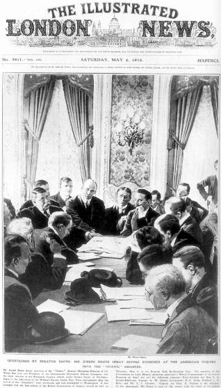 Interrogatoire de Bruce Ismay à New York